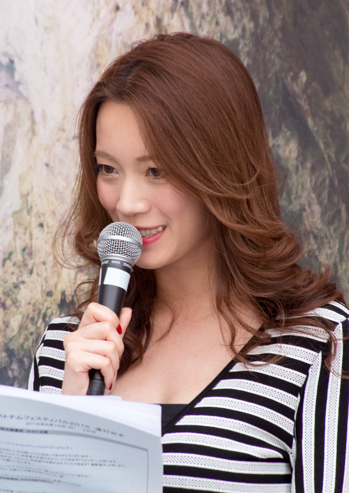 VietNam Festival 2016